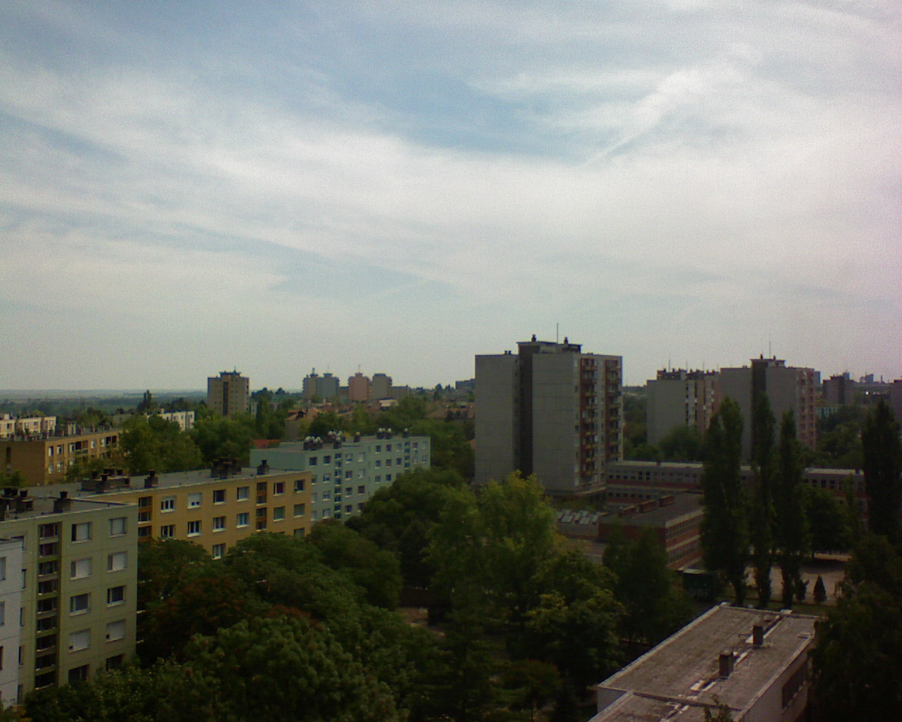 Dunaújváros, a fennsíkra épült város